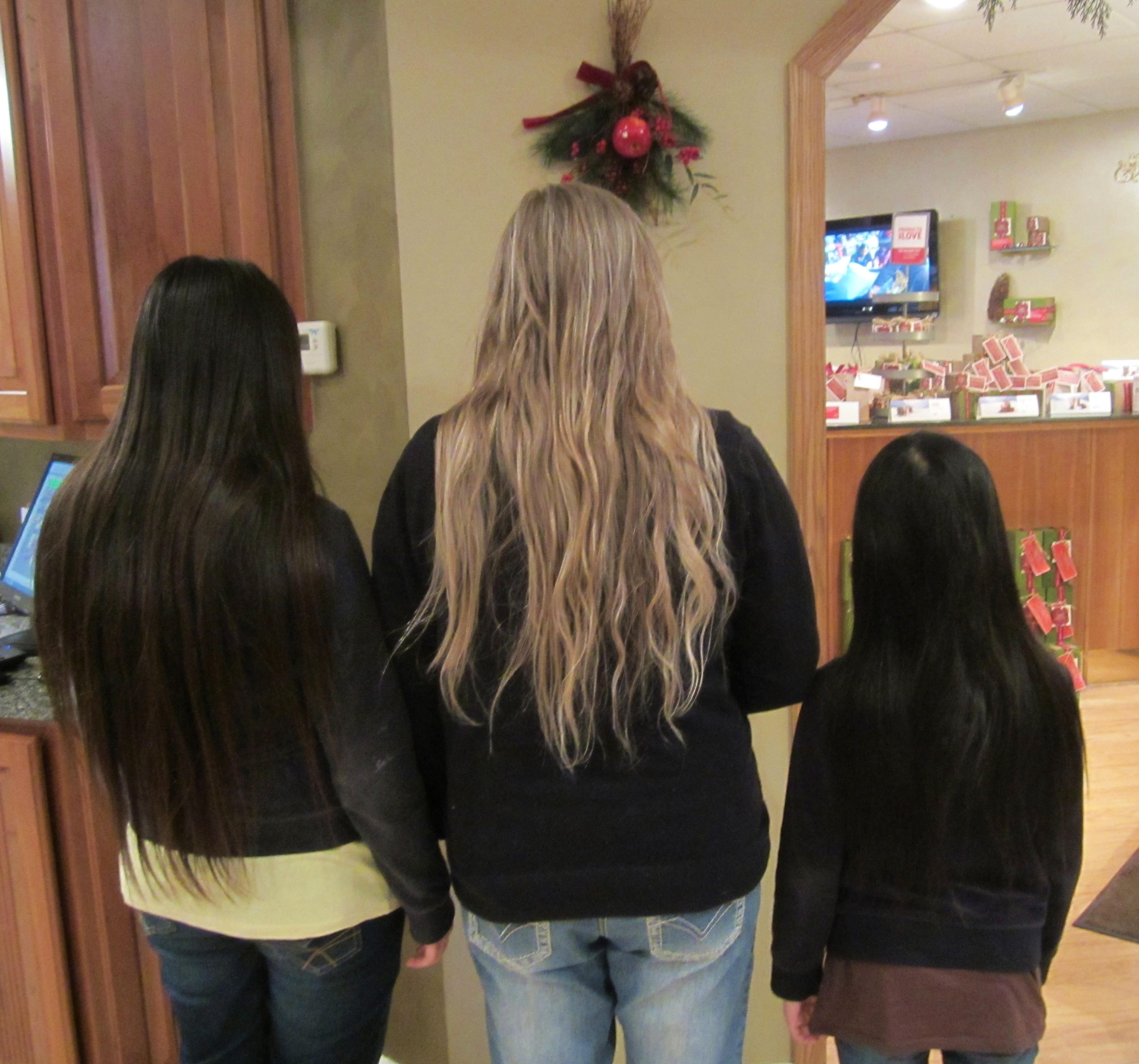 Blogged here